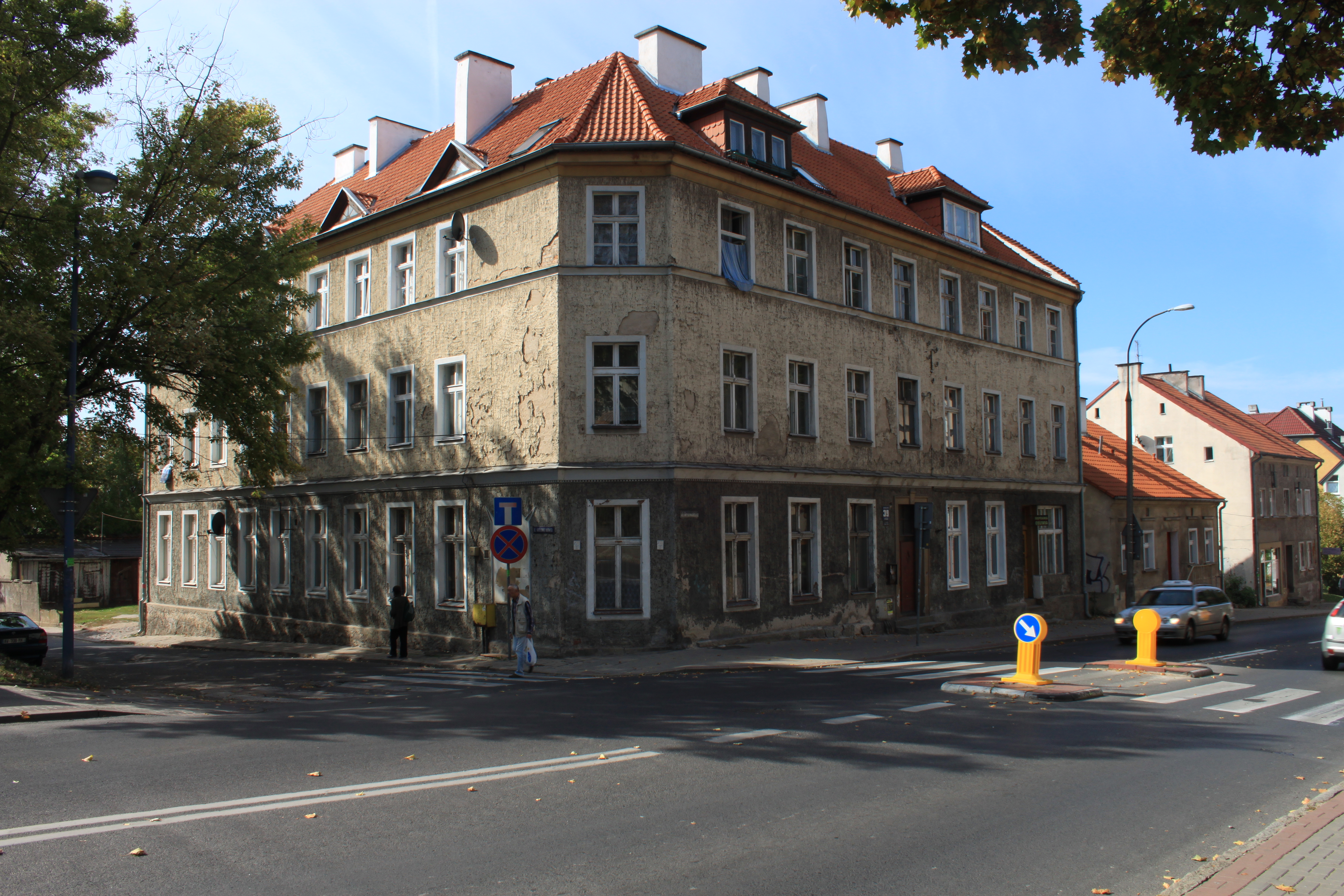 Olsztyn, dom, pocz. XX